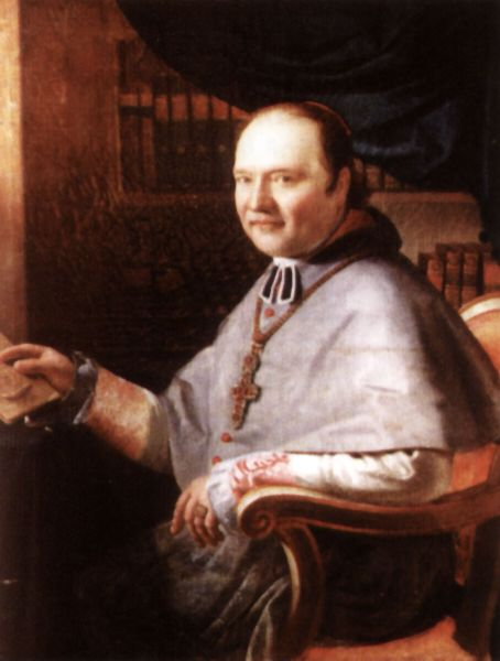 Franciszek de Paula Pisztek (1786-1846)Bischof von Tarnów von 1832 bis 1836